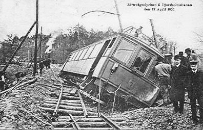 Urspråning av Djursholmsbanan 1906